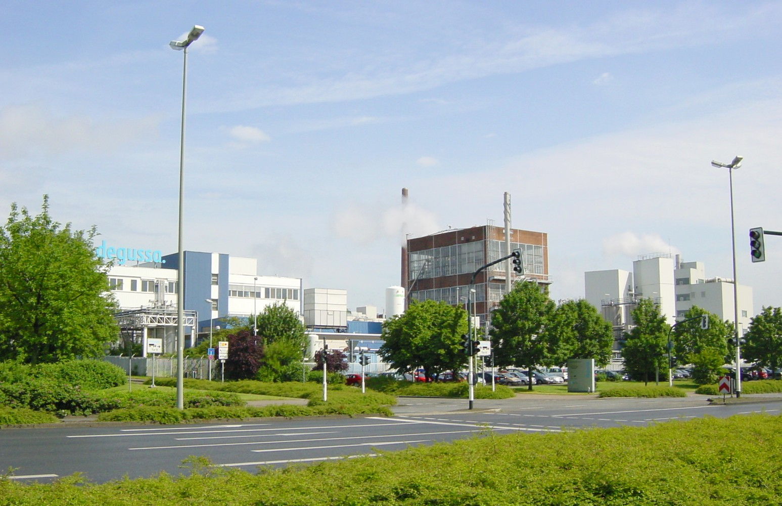 Degussa, Standort Krefeld